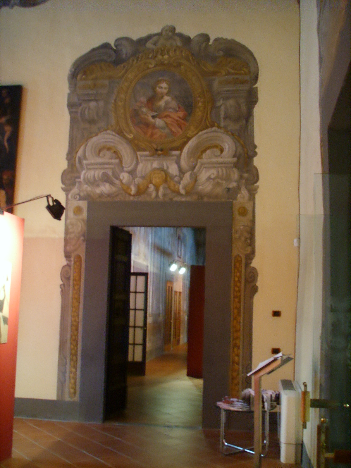 Palazzo vai, affreschi sala 1